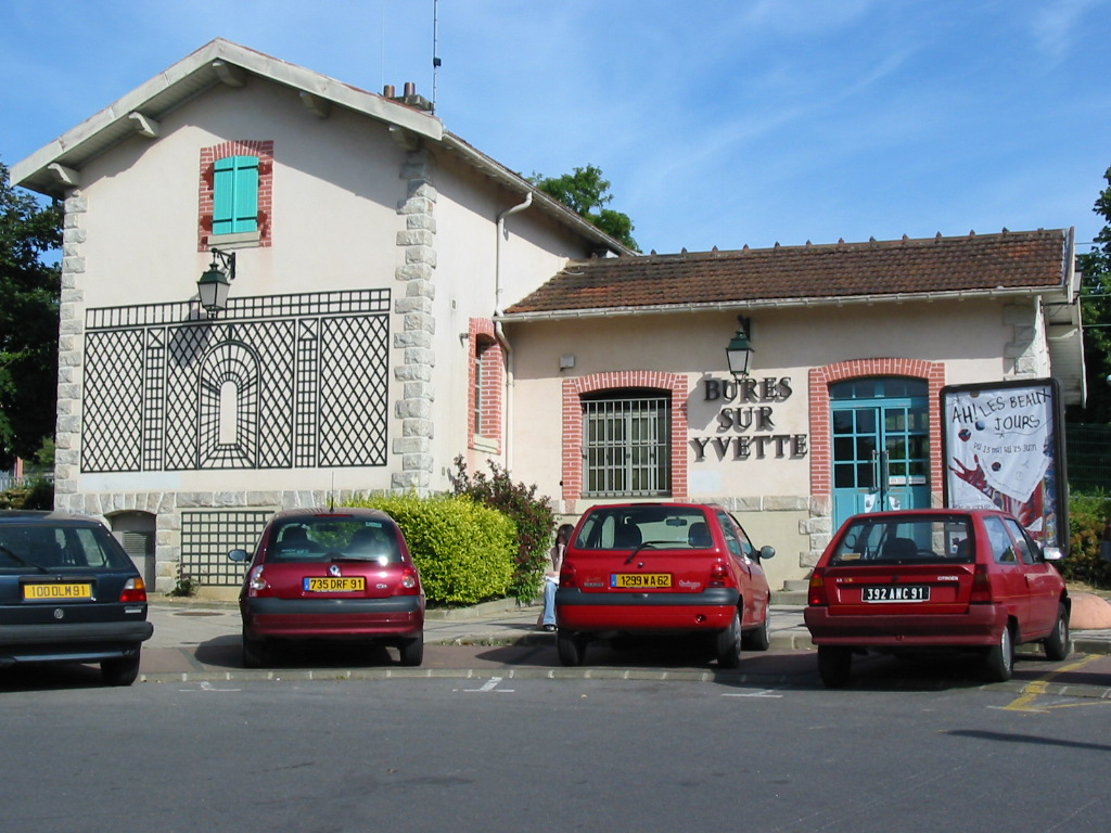 gare de Bures-sur-Yvette, RER B, France